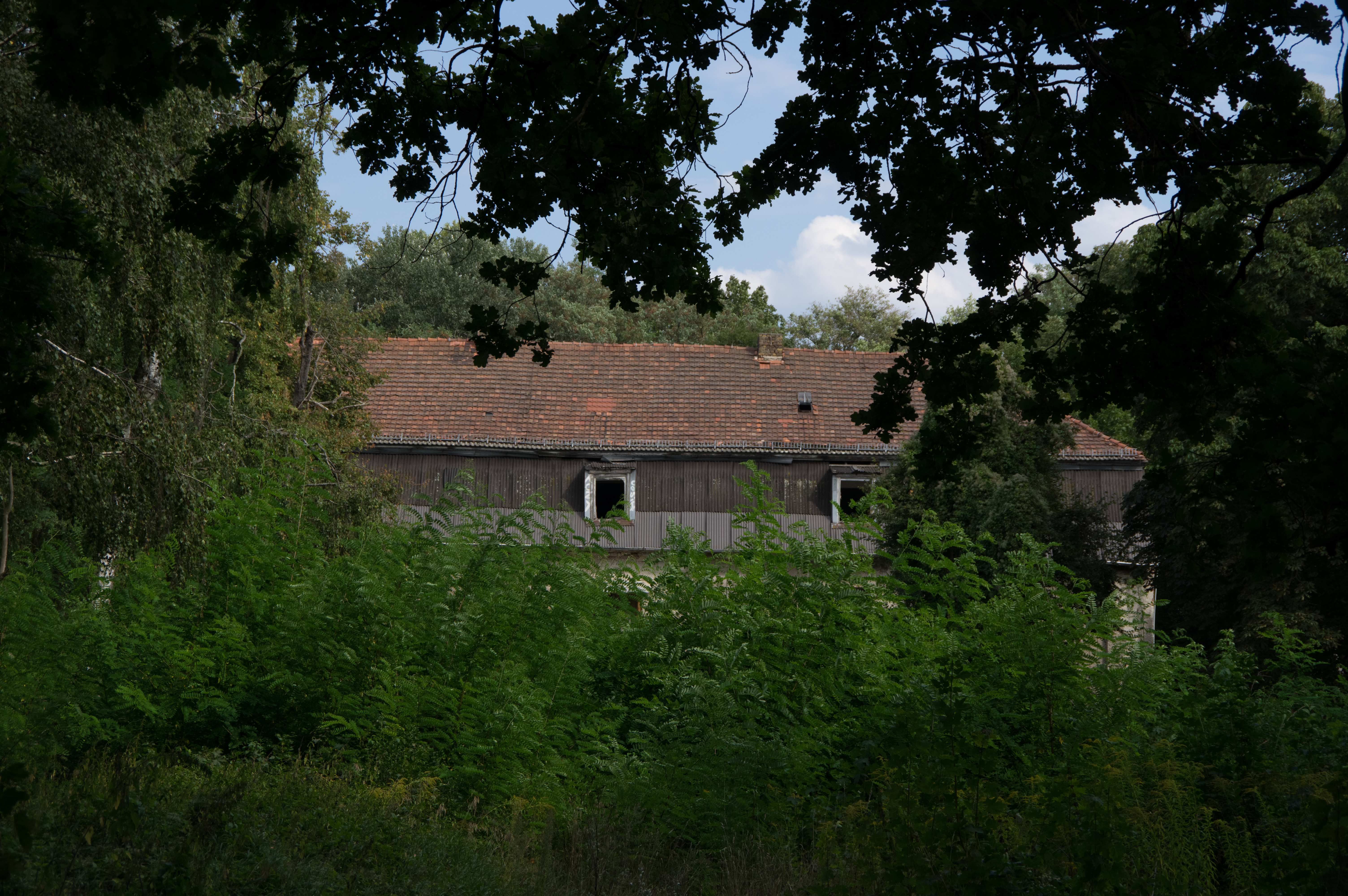 Das Haus steht unter Denkmalschutz. Hier wohnten vor dem Zweiten Weltkrieg Gustav Gründgens mit seiner Frau.